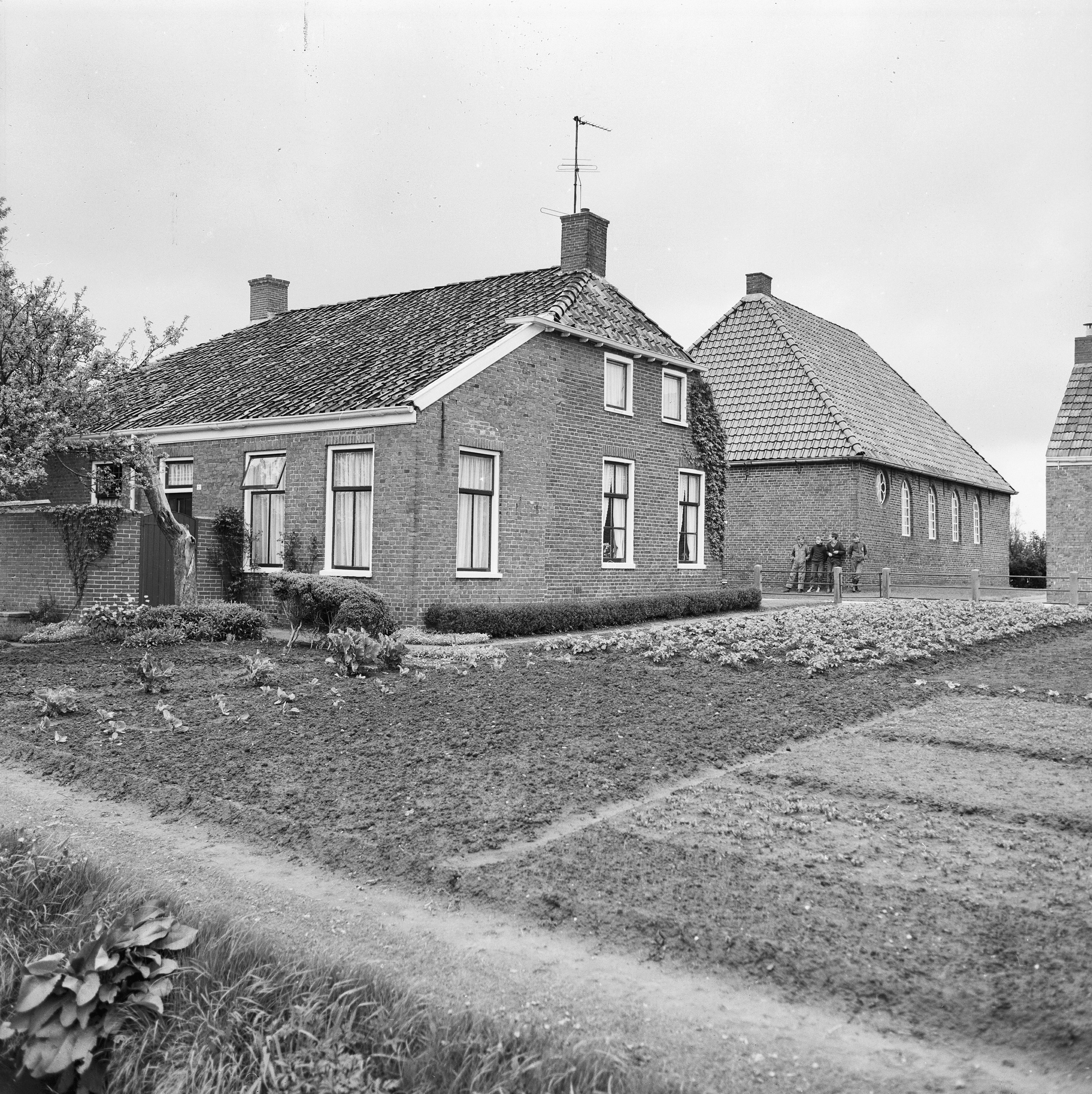 Fivelweg 31, aanzicht